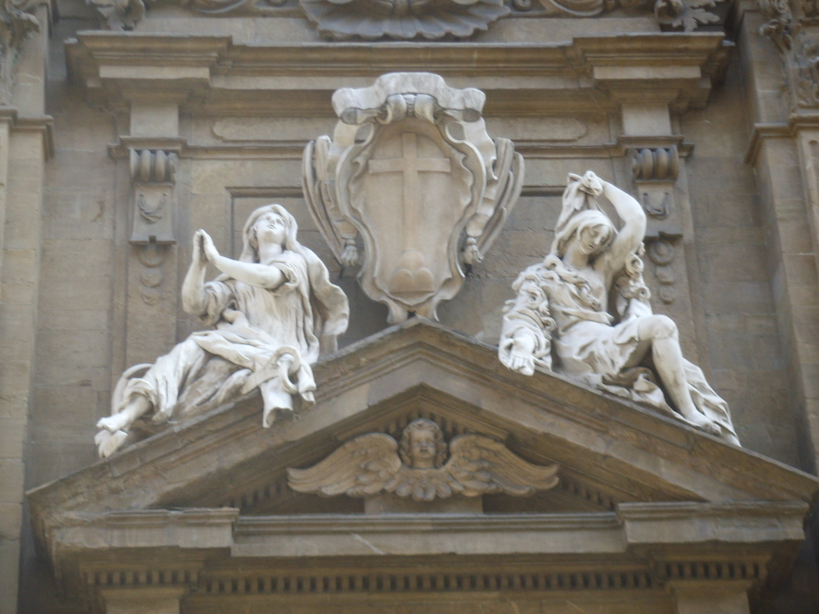 Chiesa di san gaetano, facciata, speranza e povertà tra lo stemma dei teatini, balthasar permoser